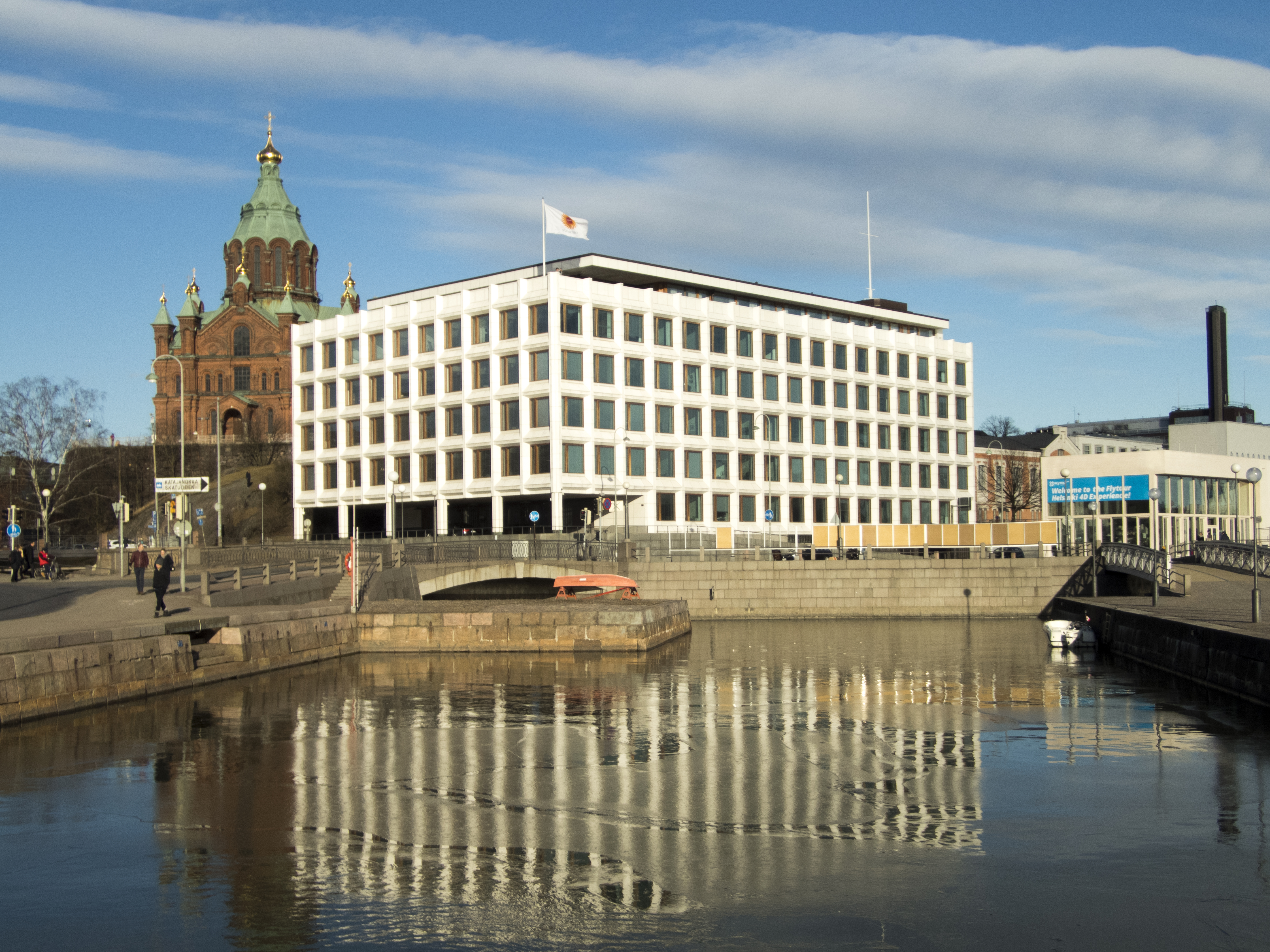 Enso-Gutzeits huvudkontor, byggnadsår 1959 – 1962. Arkitekt Alvar Alto